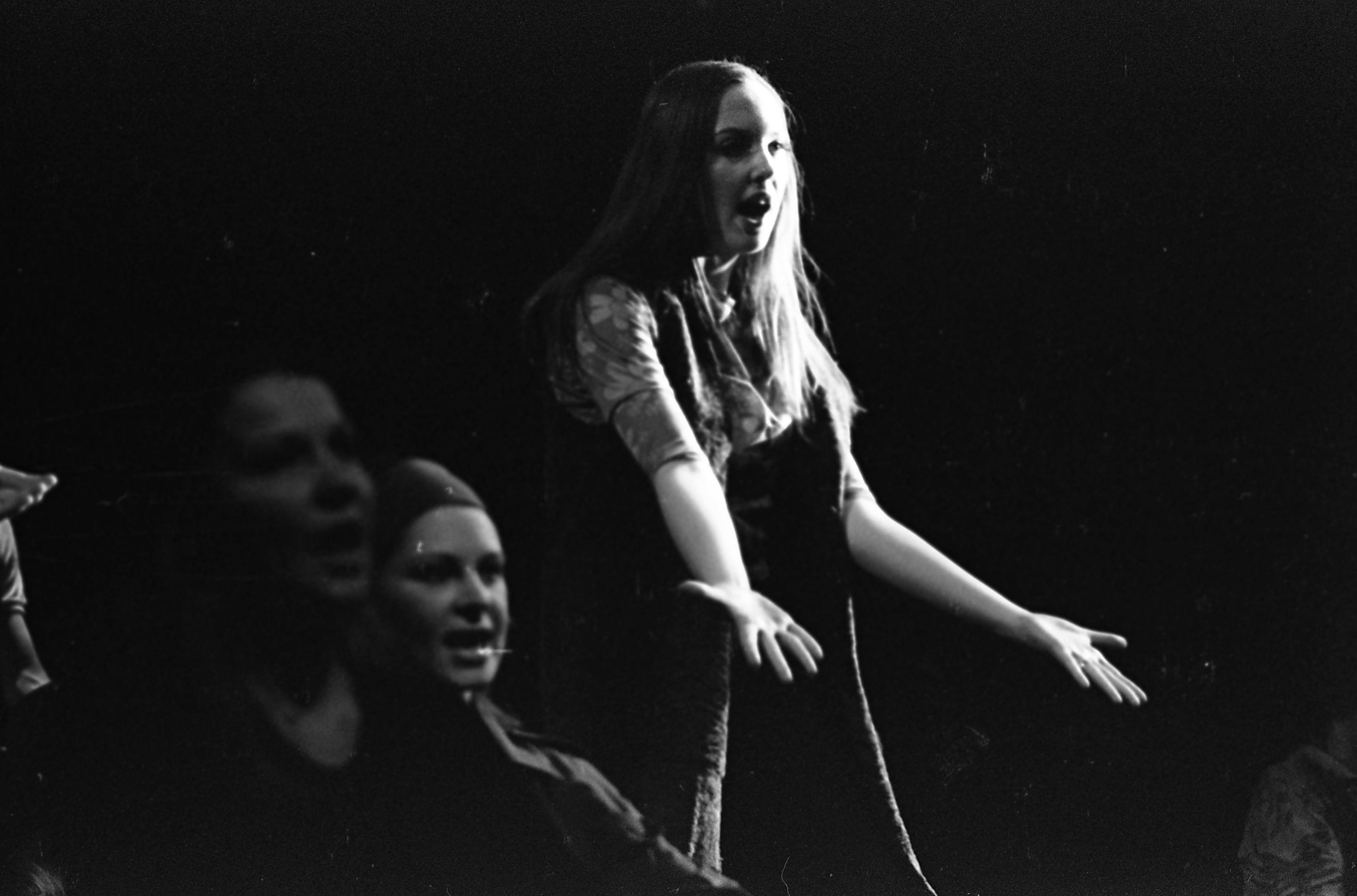 Vígszínház, a Képzelt riport egy amerikai popfesztiválról című musical előadása, Egri Márta, mellette Szegedi Erika. Location: Hungary, Budapest XIII. Tags: Budapest Title: Vígszínház, a Képzelt riport egy amerikai popfesztiválról című musical előadása, Egri Márta, mellette Szegedi Erika.